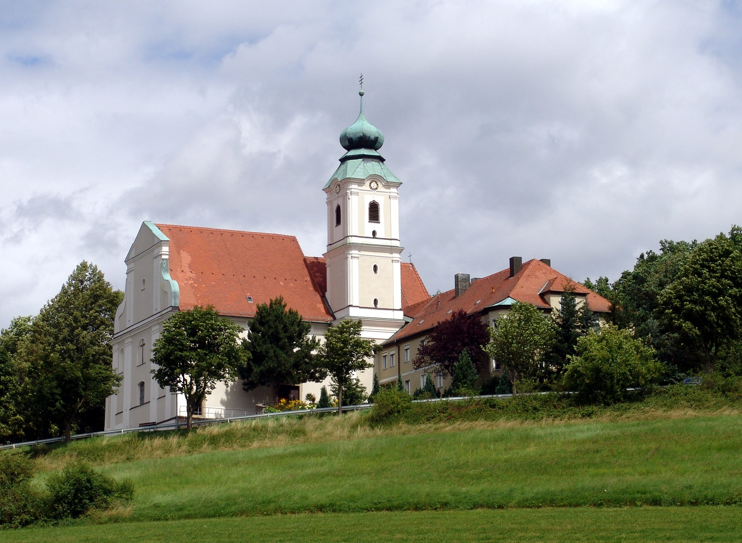 Wallfahrtskirche St. Felix, erbaut 1735 - 1749